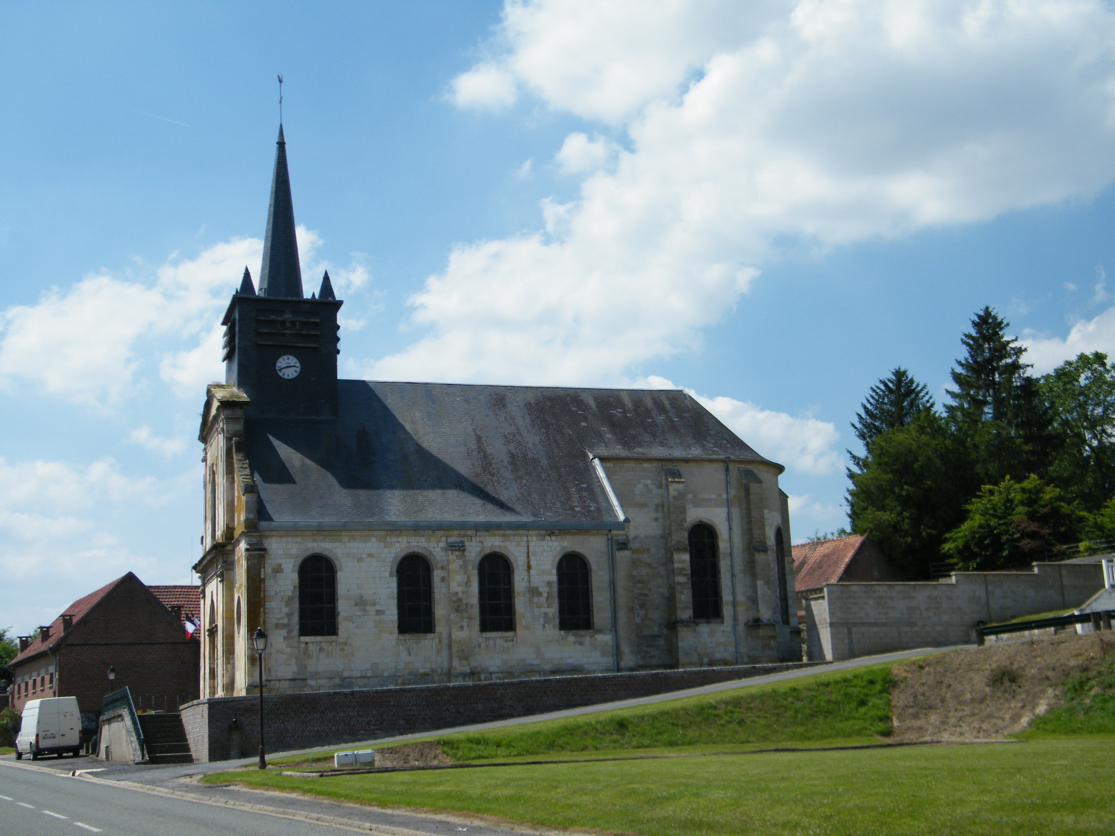 église.